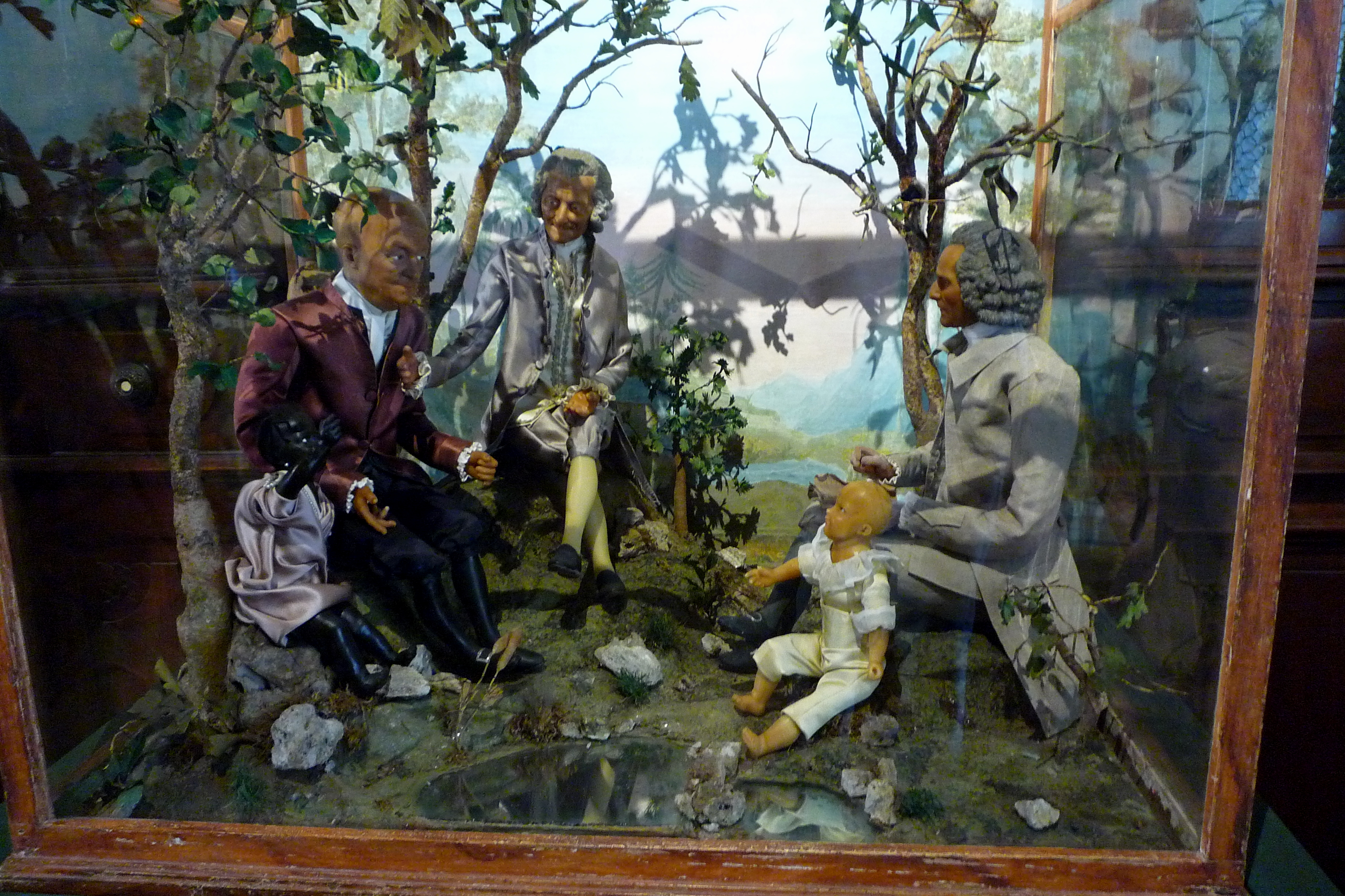 Cabinet de cire. Auteur :Orsy. Représente Franklin, Voltaire et Rousseau aux Champs Élysées vers 1791-1793. Musée de la Révolution française, Vizille.